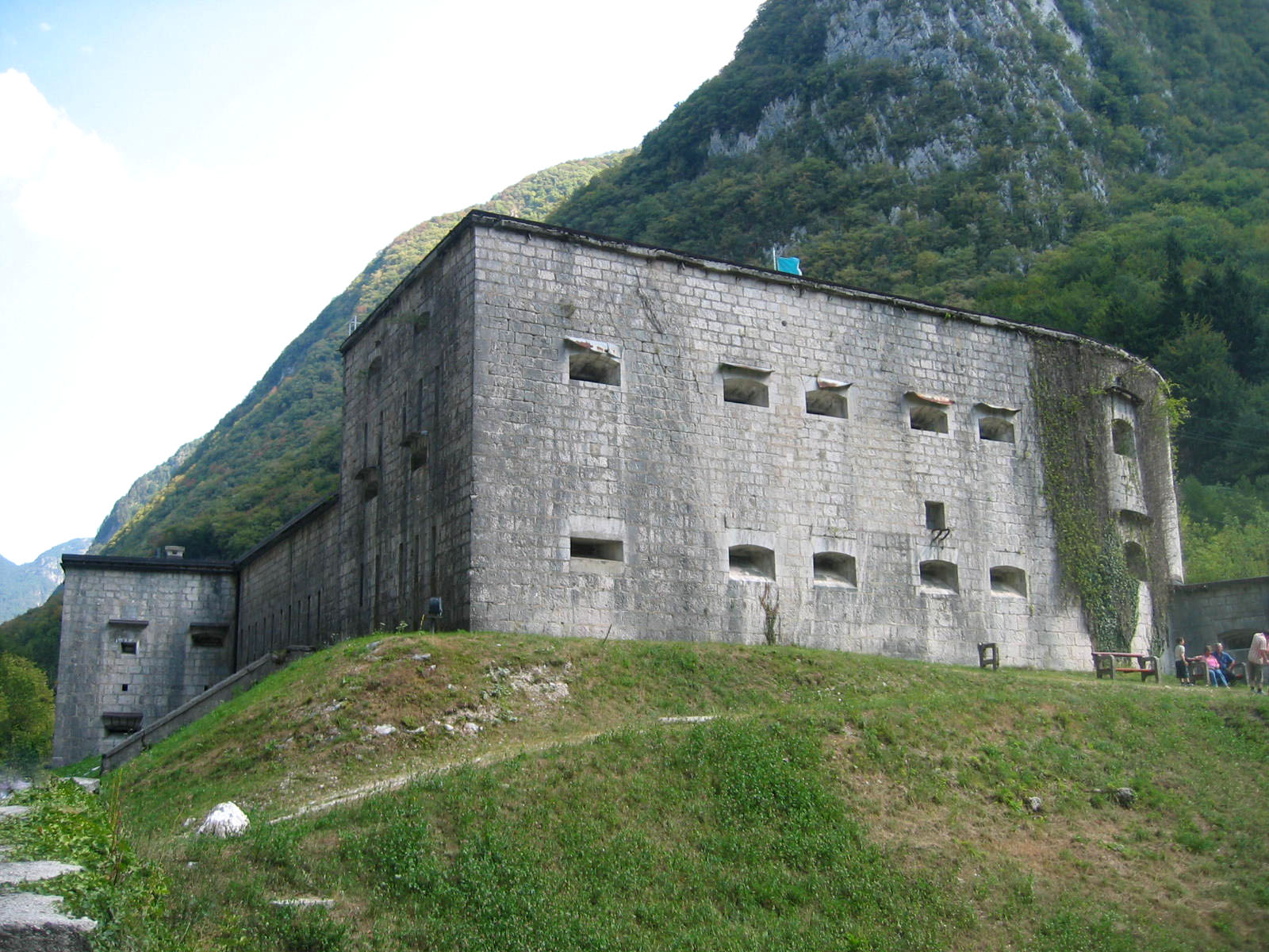 Spodnje Kluže (german: Flitscher Klause), WW1 fortress near Bovec (German: Flitsch) in Slovenia (Alps) photo: Ziga 14:58, 10 April 2007 (UTC)